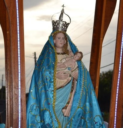 Padroeira de Valença do Piauí. 300 anos de devoção.